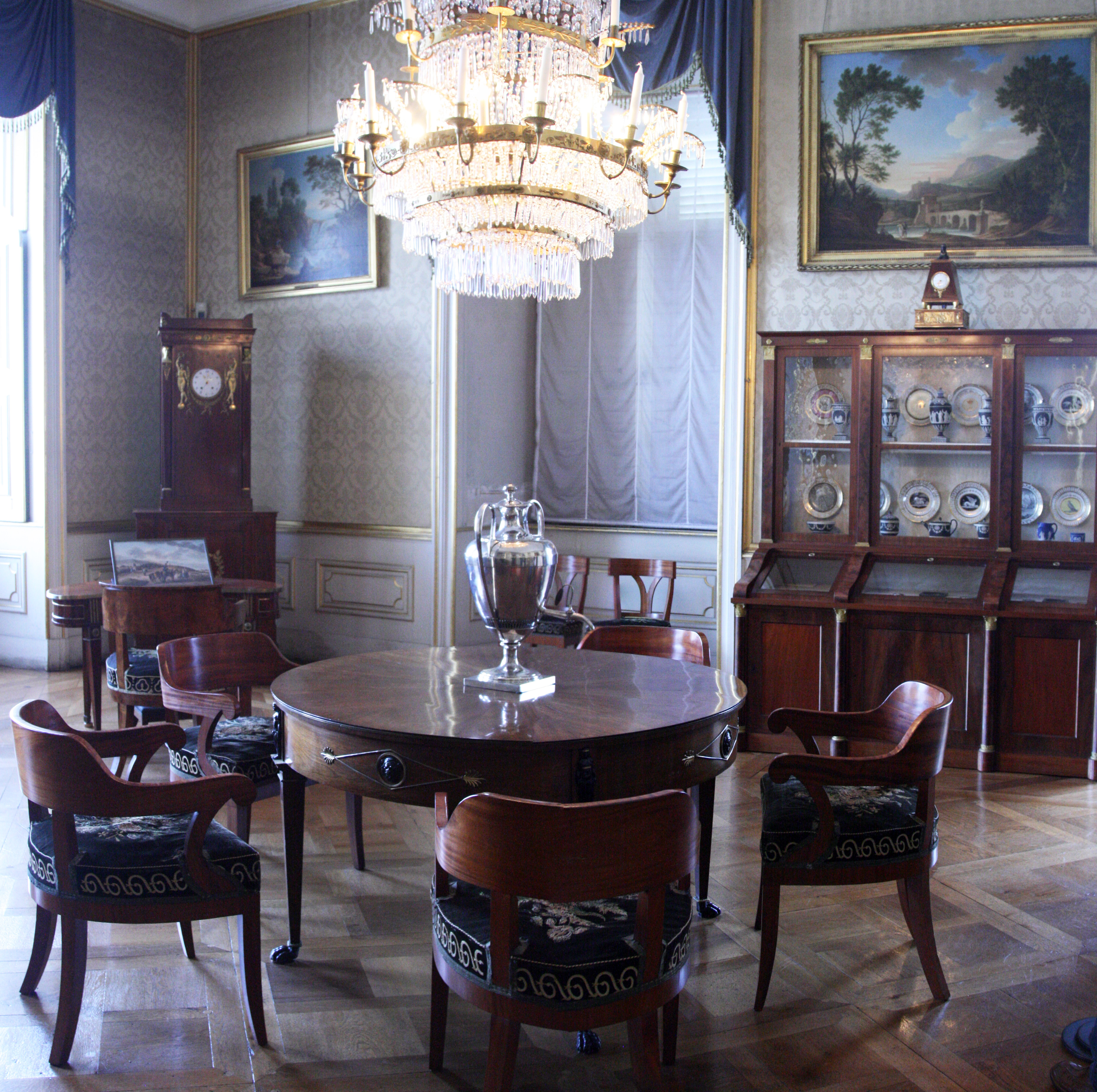 Sommerarbeitszimmer der Königin Charlotte Mathilde im Residenzschloss Ludwigsburg. Stickereien und die Teller im Schrank gegenüber wurden von Königin Charlotte Mathilde selbst bemalt. Im Hintergrund der ausgesägte Tisch, der Legende nach für den dicken Bauch von Königs Friedrich I. von Württemberg ausgesägt.